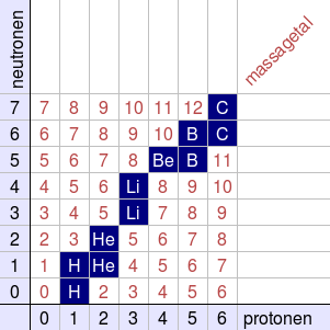 Relatie tussen massagetal, aantal protonen en aantal neutronen in de kern voor elementen met t/m koolstof